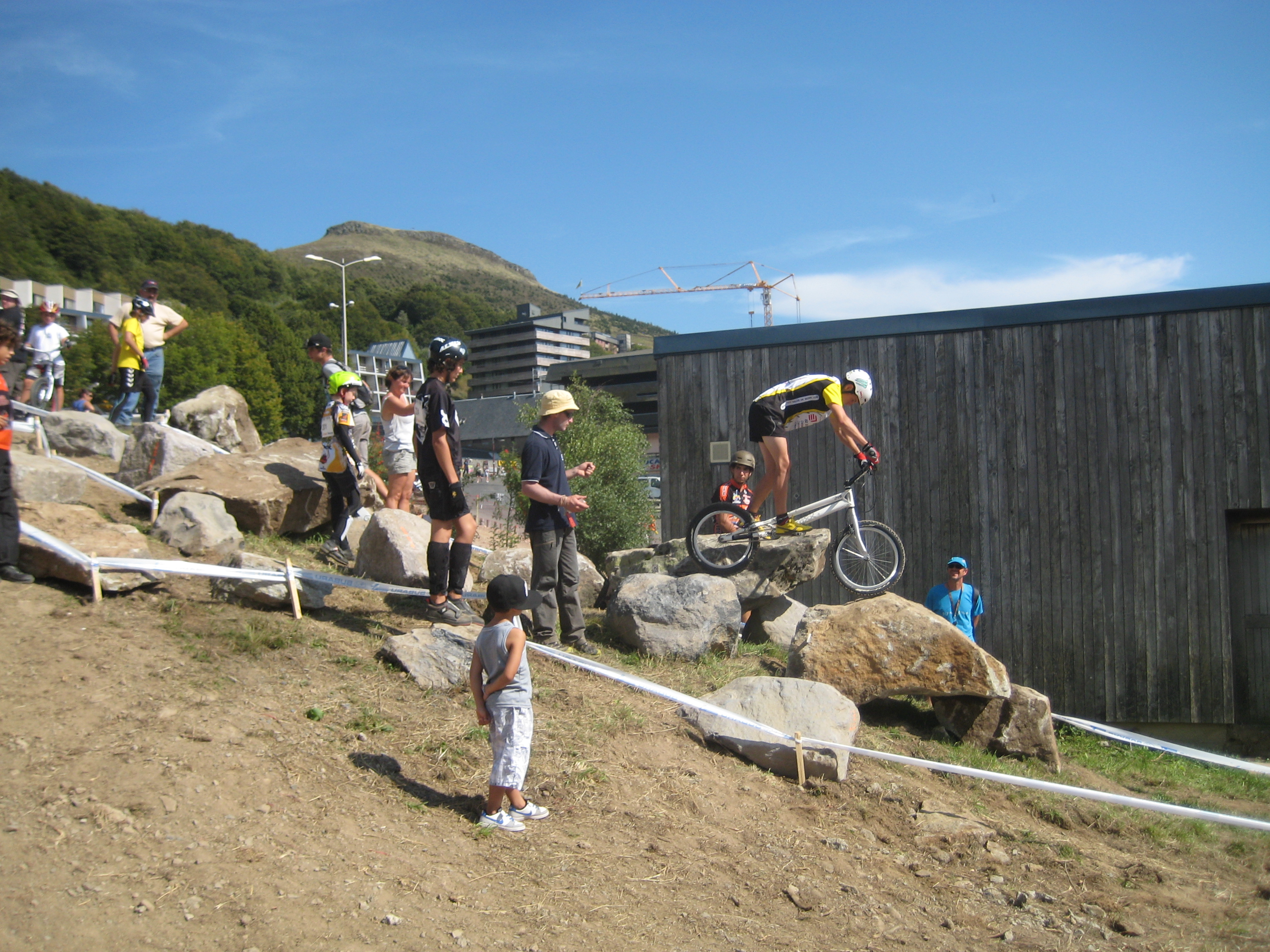 épreuve de Trial Coupe de France 2011